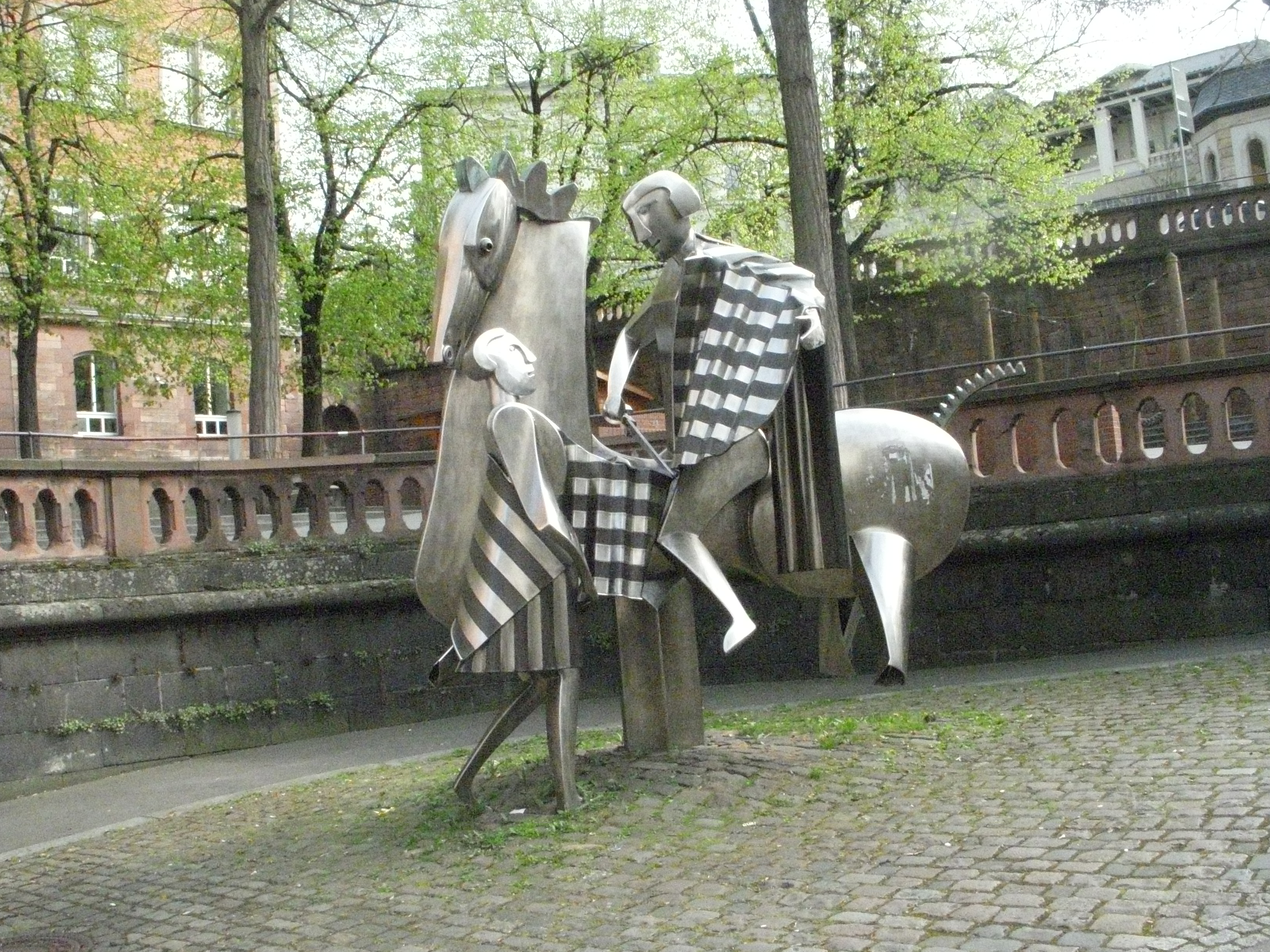 Metallskulptur Sankt Martin, Fürstenbergerhofschule, Martinusschule, Weißliliengasse, Mainz. Die Skulptur wurde 1997 anlässlich des 1600ten Todestages des hl. Martin von Tour, Patron des Mainzer Doms, der Diözese und Stadtpatron, eingeweiht. Das Werk thematisiert das Thema Teilen in der christliches Werteordnung. Karl Kardinal Lehmann vergab den Auftrag an Albert Sous.